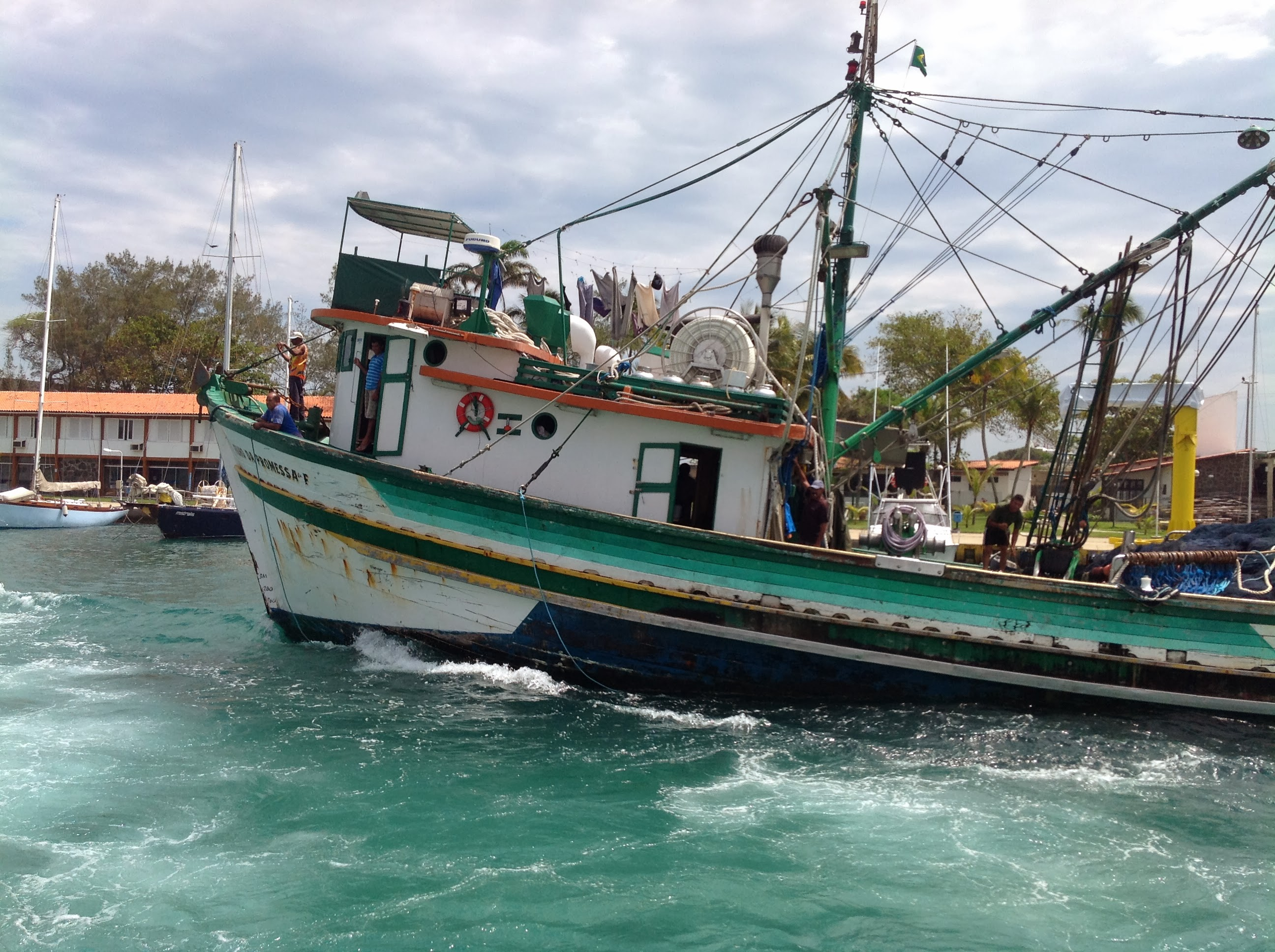 Cabo Frio - State of Rio de Janeiro, Brazil